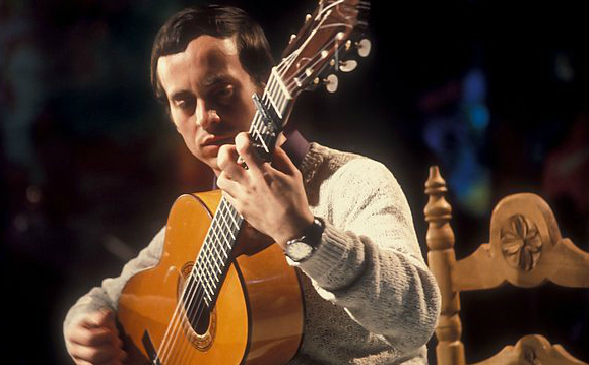 Paco Peña em Londres